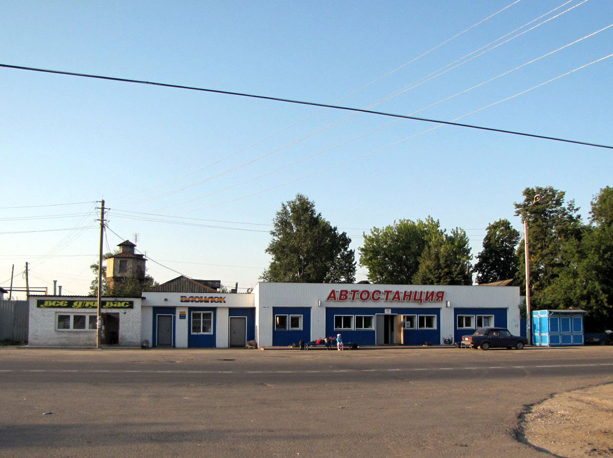 Автостанция в Туме